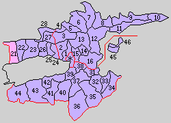 後の島根県八束郡域の町村制時点の町村。